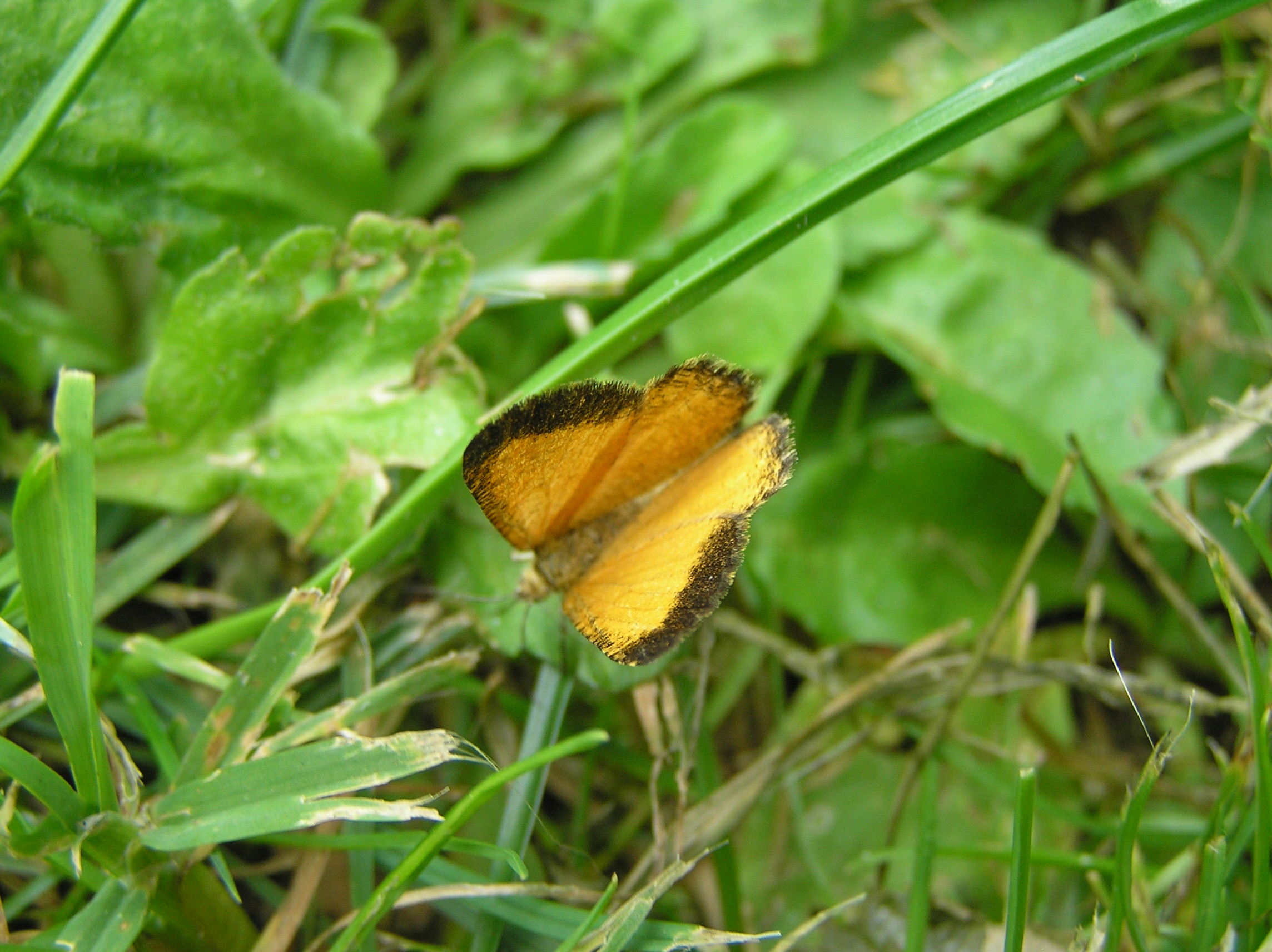 Isturgia limbaria (Montbrison, Loire, France)